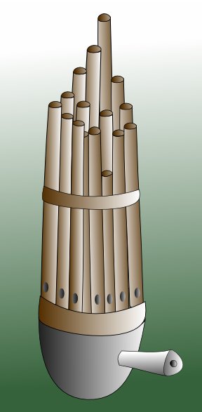 Grafik selbst erstellt